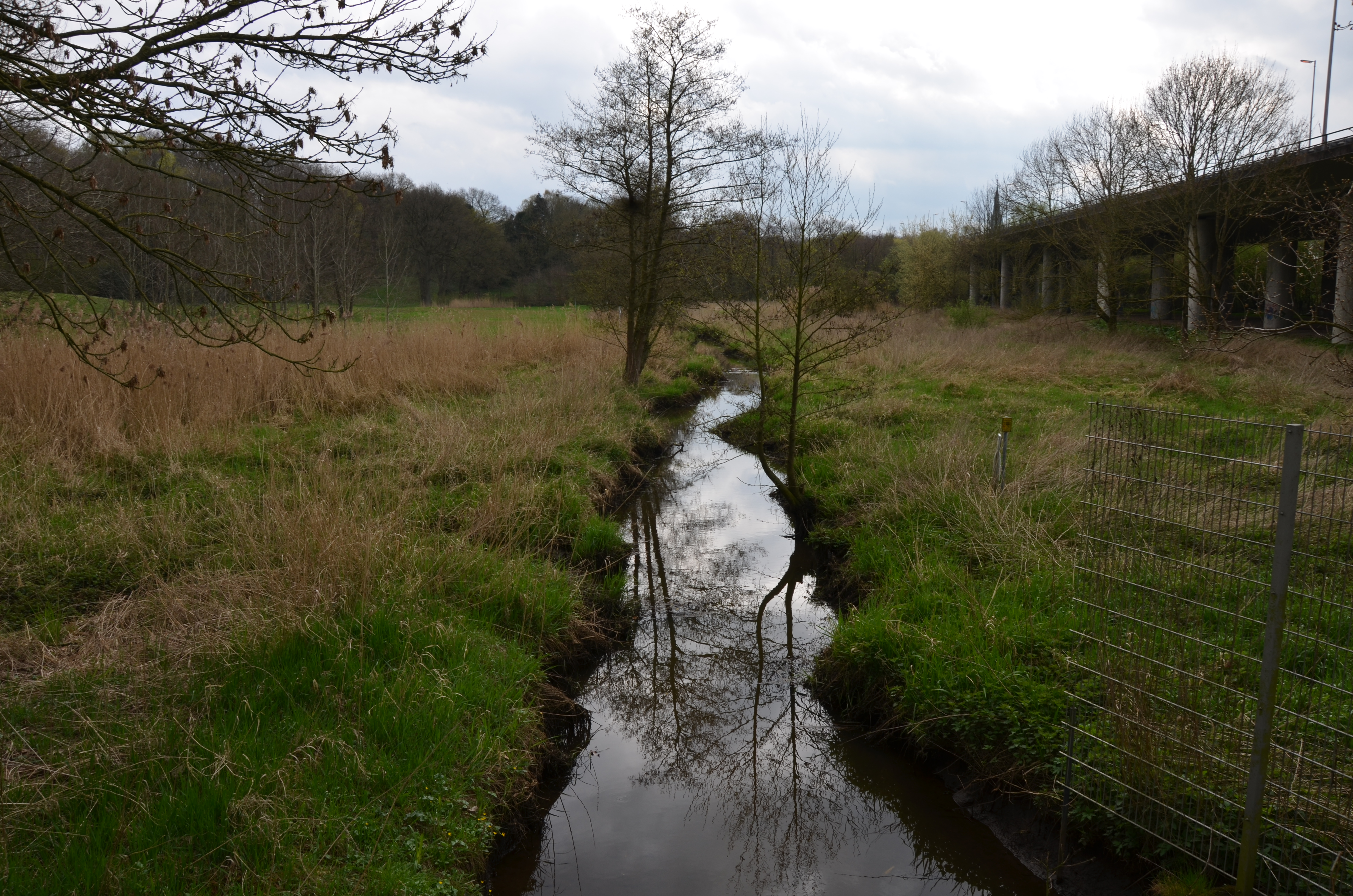 Blumenthaler Aue, Bereich im Landschaftsschutzgebiet „Bremen 1968 3. Änderung“, Wasserschutzgebiet Blumenthal; rechts im Bild A270-Brücke/Hochstraße